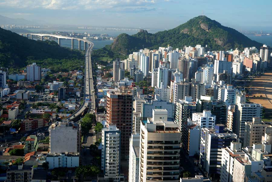 Início da subida de Vila Velha para Vitória